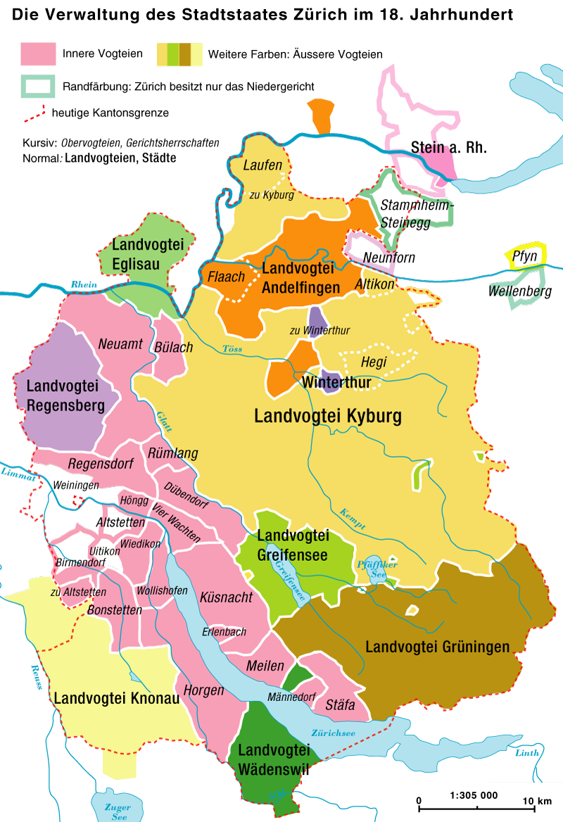 Die Verwaltungsgliederung des Staatstaates Zürich im 18. Jahrhundert